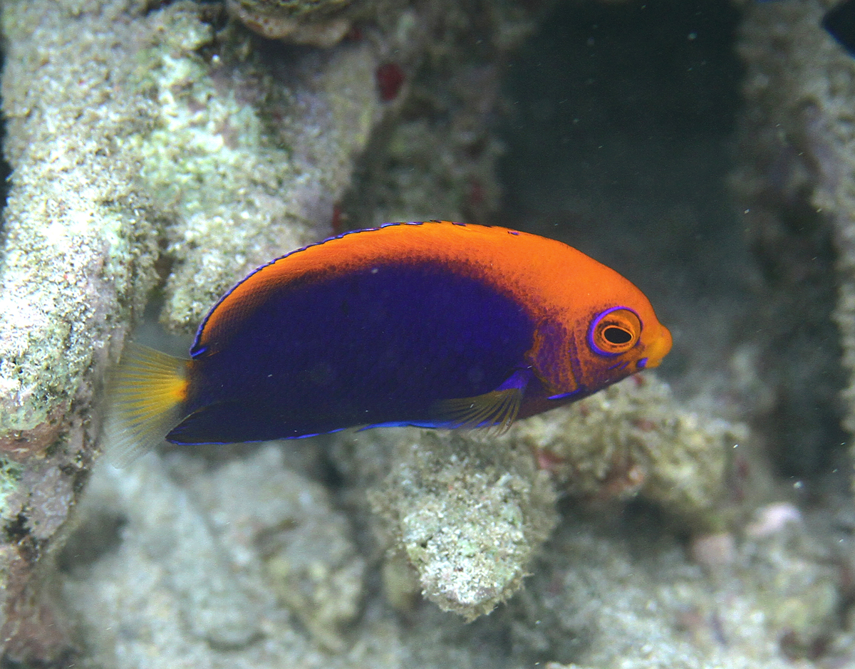 Un poisson-ange africain (Centropyge acanthops) à la Réunion.